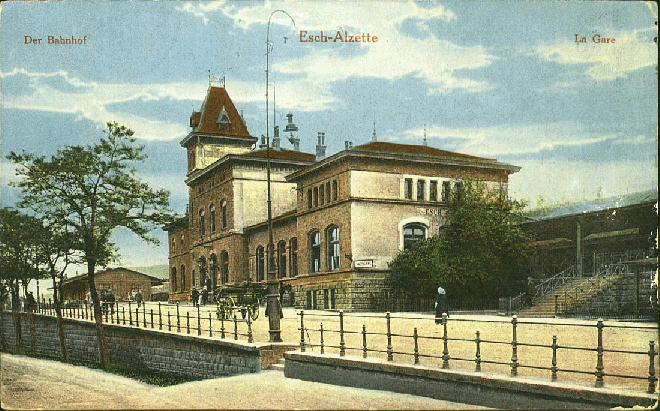 Esch-Alzette, la Gare, vers 1917. Carte postale Edition Kremer-Muller.